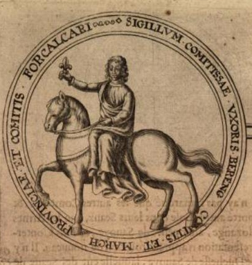 Pečeť Beatrix Savojské